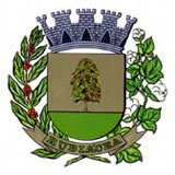 Brasão de Rubiácea